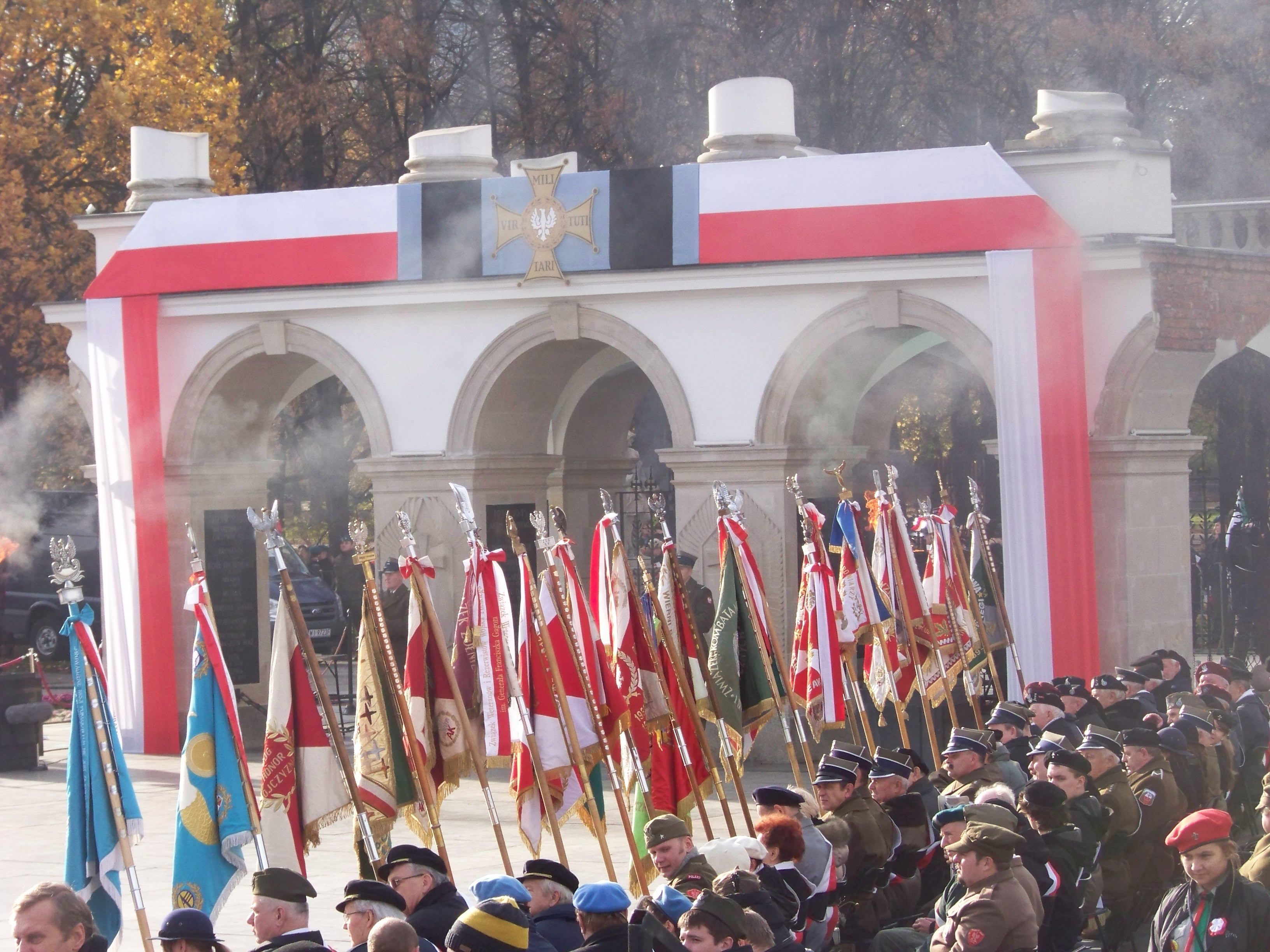 Grób Nieznanego Żołnierza w Święto Niepodległości 2012.